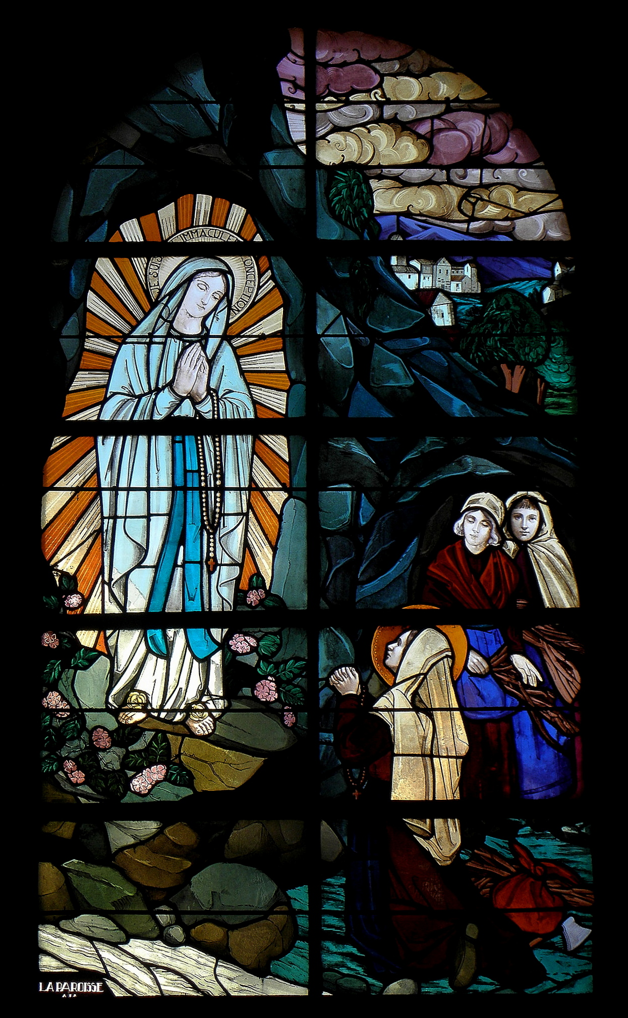 Vitrail de l'église Saint-Pierre de Taillis (35). Apparition de Lourdes.